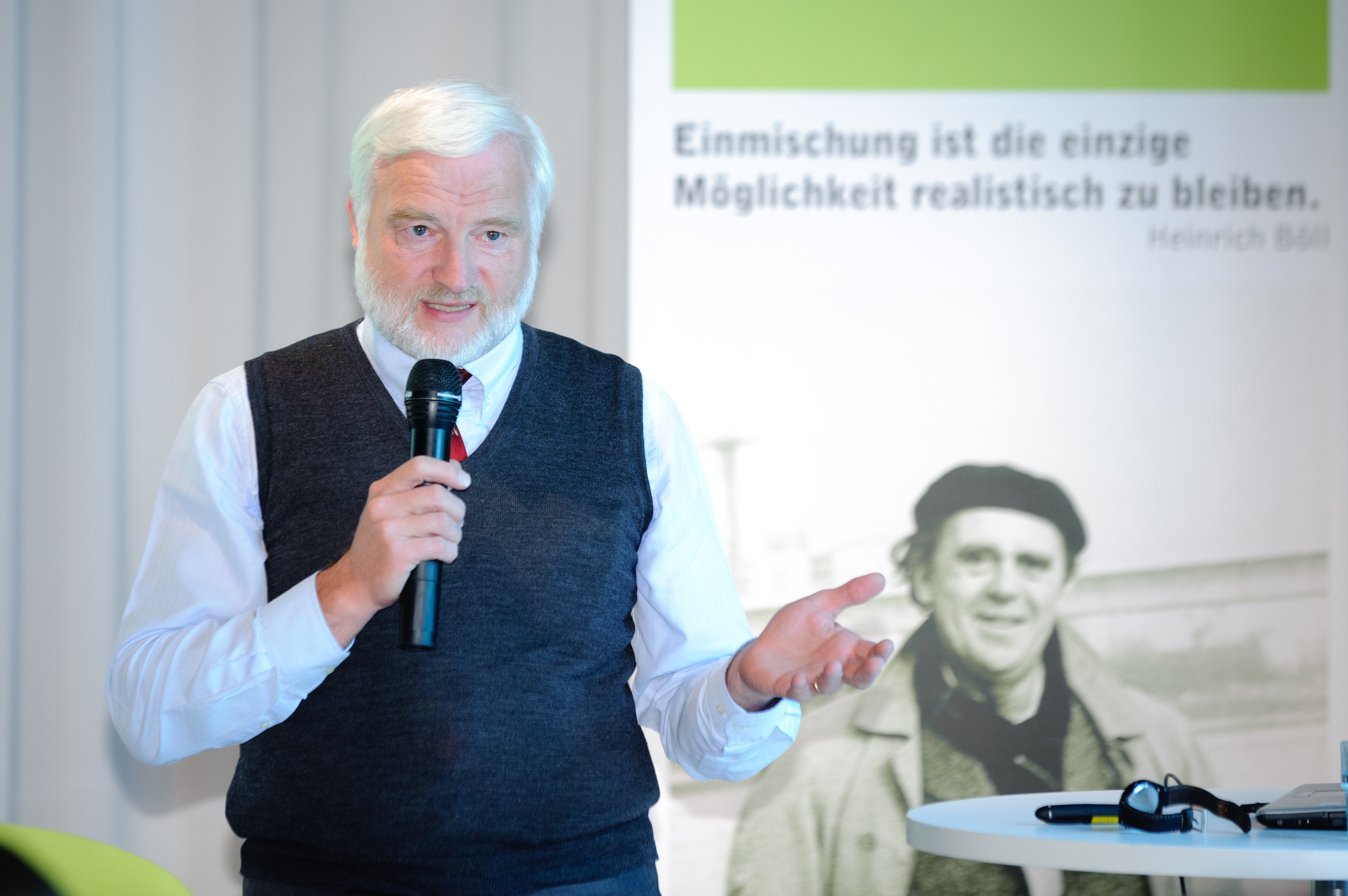 Olav Hohmeyer (Prof. f. Energie u. Ressourcenwirtschaft, Uni Flensburg) Foto: Stephan Röhl